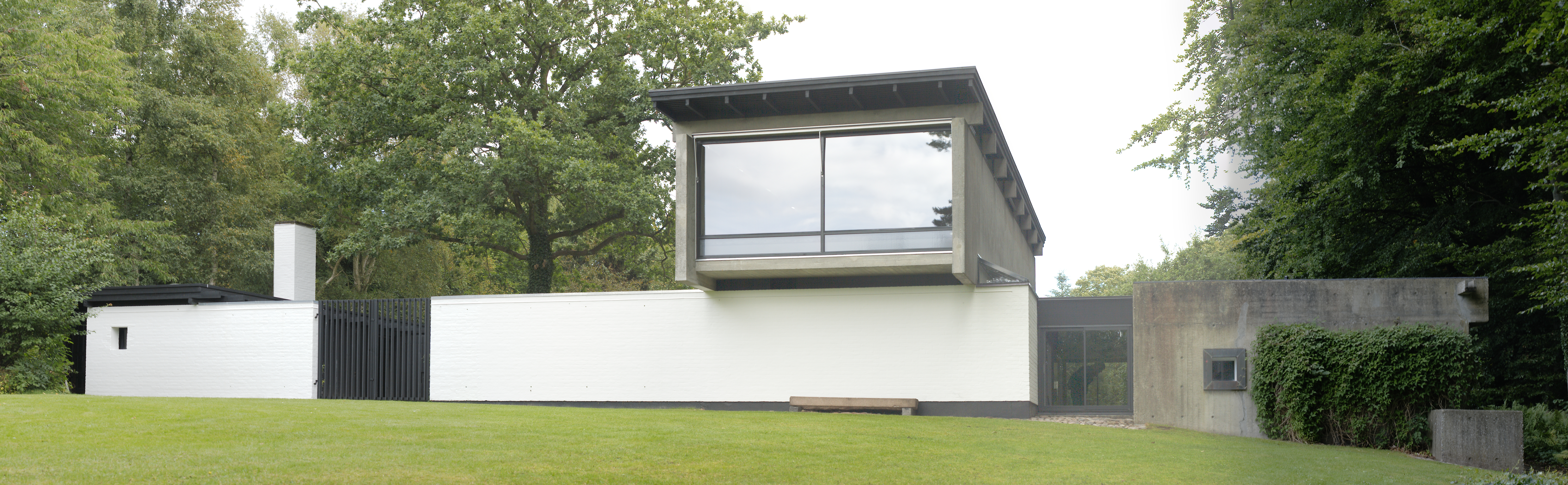 Højen 13, Brabrand